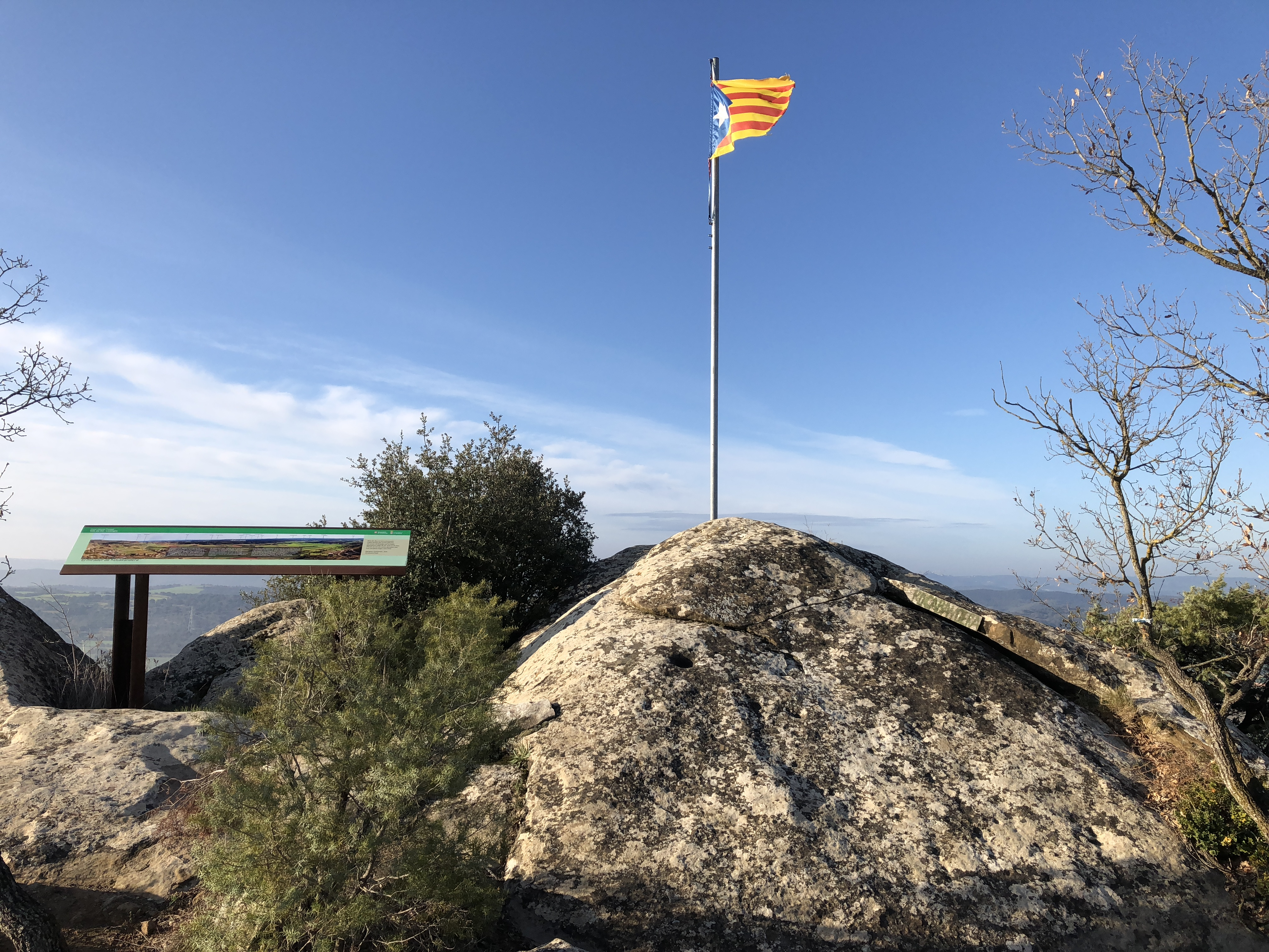 Fotografia del mirador de Rocabandera, on està situada la roca (amb el forat i la bandera) i el panel informatiu explicatiu, al cim del turó.